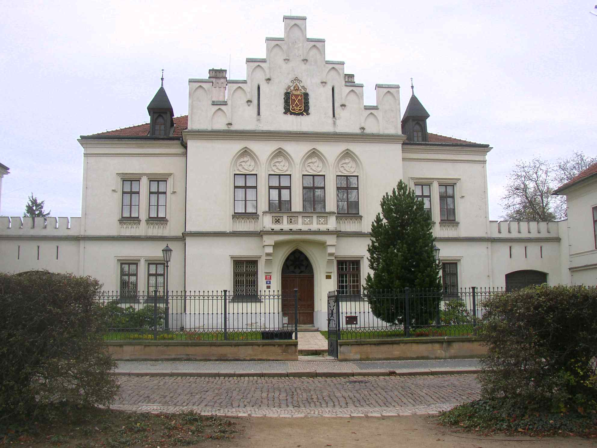 New Deanery in Vyšehrad, Prague, Czech Republic. Designed by František Novák and (?) Jan Ripota, built in 1877-1878. Nové děkanství na pražském Vyšehradě, postavené v letech 1877-1878 podle návrhu Františka Nováka a (?) Jana Ripoty. Photo taken by Miaow Miaow in October 2005, PD-self